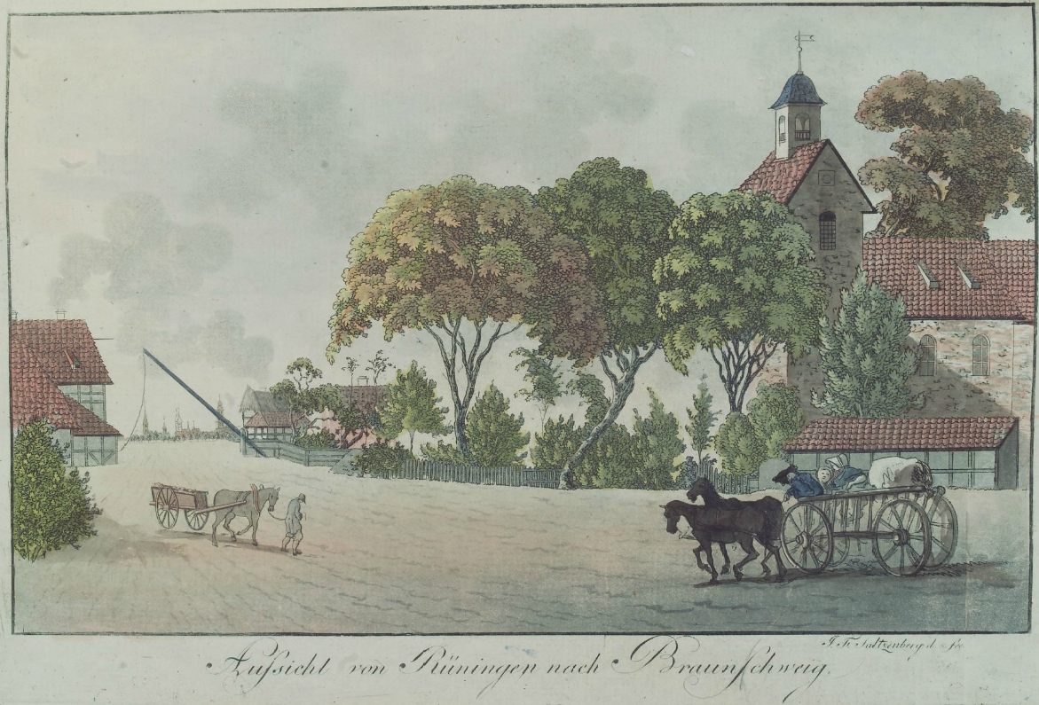 Bild von Rüningen von Johann Friedrich Saltzenberg. Zeitraum Ende 18. Jahrhundert bis erste Hälfte 19. Jahrhundert. Aus der Sammlung von Karl Gesenius (1746–1829).